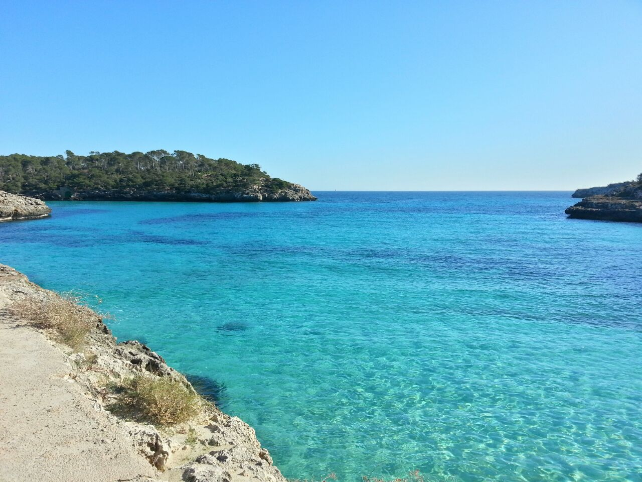 Cala Mondragó, Mallorca. (Spain)